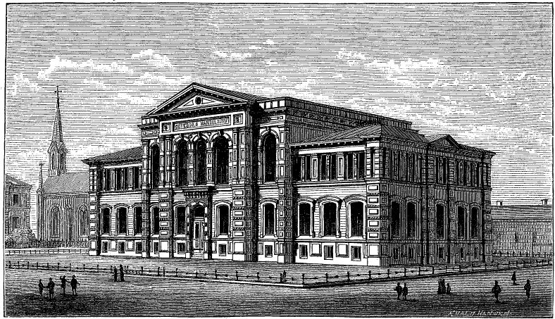 Handelsinstitutet i Göteborg vid Läroverksgatan (innanför vallgraven), invigd 1881, uppförd efter ritningar av arkitekt Adrian C. Peterson. Byggnaden kallas numera för Gustaviskolan.